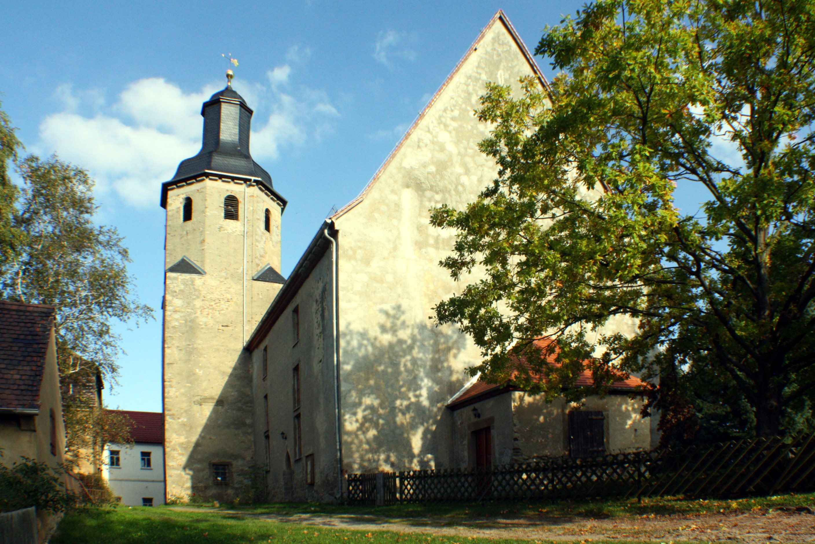 Kirche im Geraer Ortsteil Dorna in Ostthüringen